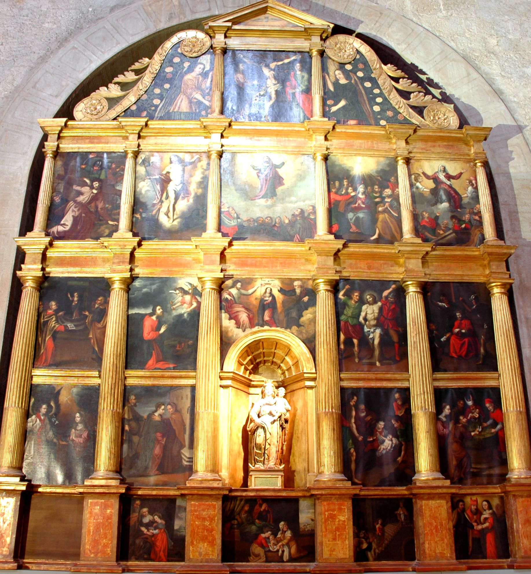 Monestir de Sant Cugat - Retaule de la Mare de Déu del Roser